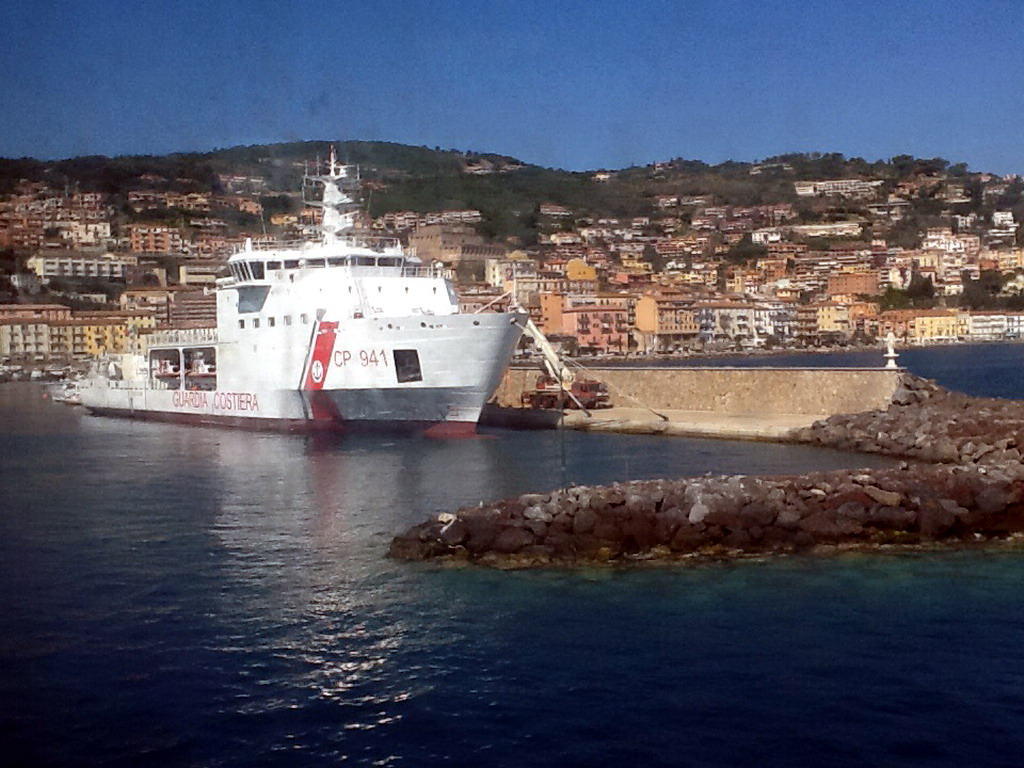 Il pattugliatore Diciotti della Guardia Costiera ormeggiato al molo Garibaldi di Porto Santo Stefano durante le prime fasi delle operazioni di rigalleggiamento della nave da crociera Costa Concordia iniziate il 14 luglio 2014